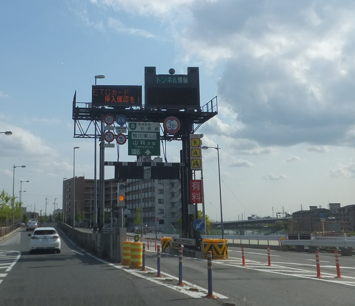 鴨川東入口